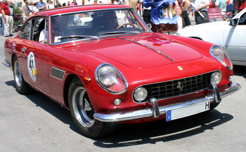 250 GTE Pininfarina (1962) 230 PS,3l Fotografiert von: Softeis bei der Präsentation der Fahrzeuge zum Gaisbergrennen in Salzburg; Juni 2004 GNU-FDL Der Besitzer des Wagens teilte mir übrigens mit, dass der 250 GTE übrigens ein Einzelstück ist, das für den Rennfahrer Teddy Pilette gebaut wurde.